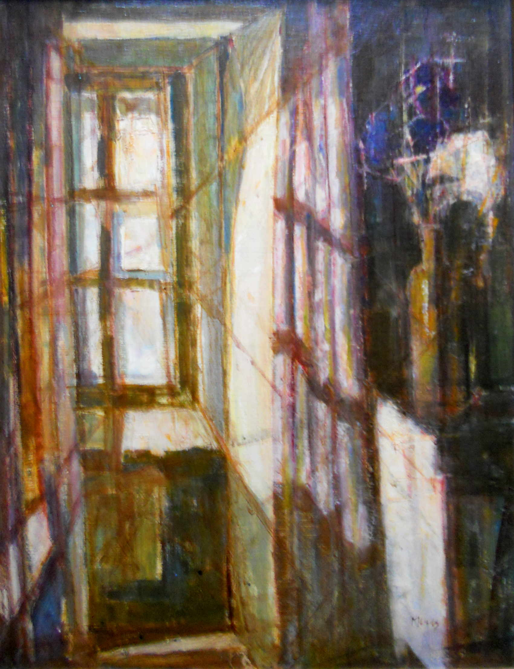 Albert Muis Titre: Fenêtre,Atelier Mas Rossignol, Argelès sur Mer Huile sur toile, 65cm x 50cm